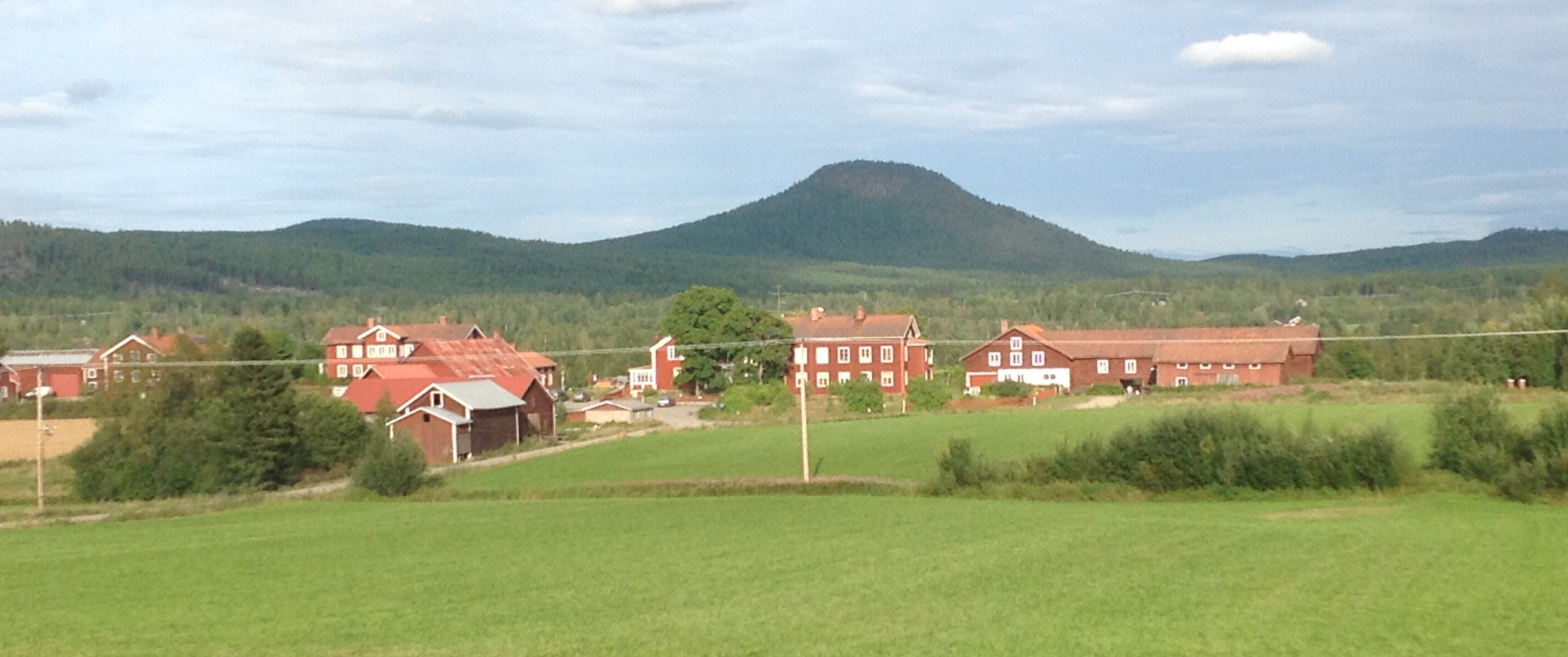 Järvsö klack utanför Järvsö, Hälsingland